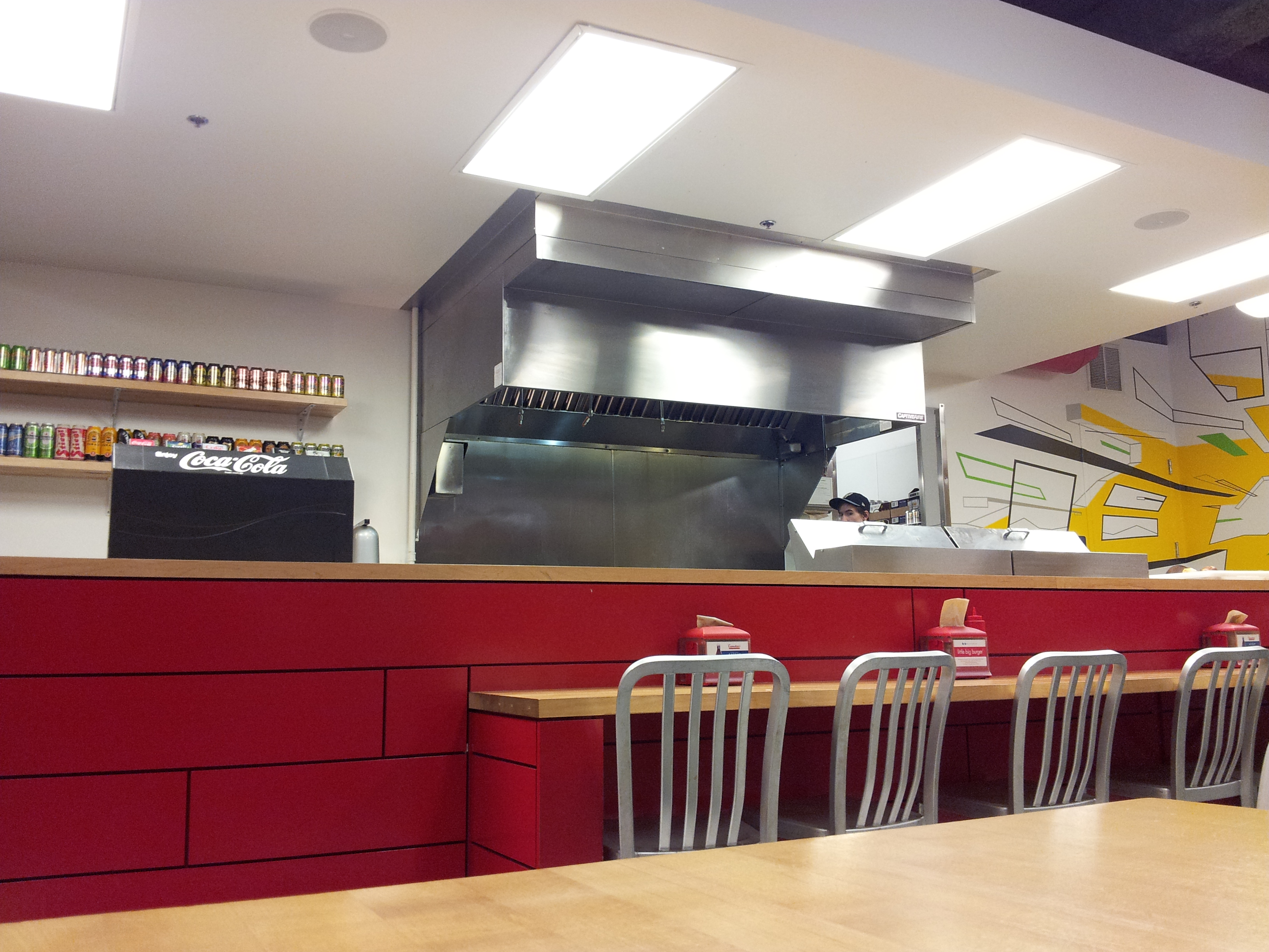 Little Big Burger, SE Divison, Portland, OR (2013)